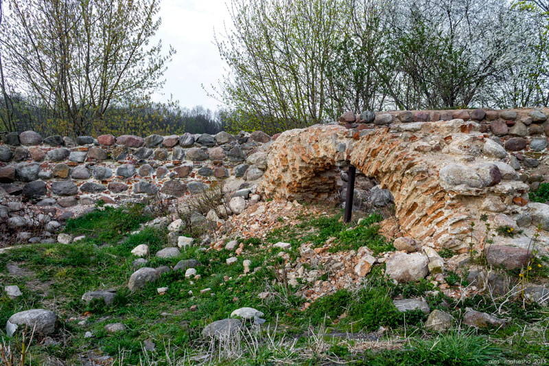 Гродна. Рэстаўрацыя Старога замка